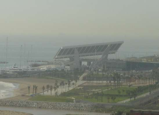 Placa Fotovoltaica al Fòrum de Barcelona